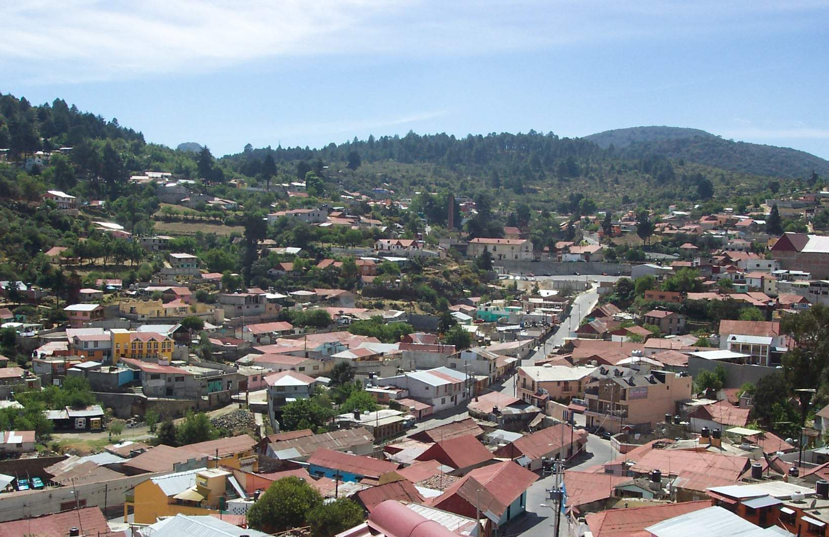 Panorámica de Mineral del Monte, Hidalgo, México